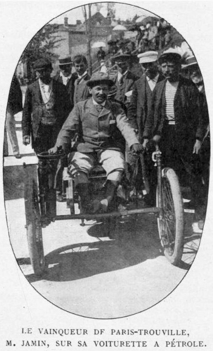 Paul Jamin, vainqueur de Paris-Trouville 1897 sur voiturette Bollée - Le Sport universel illustré du 28 août 1897, p.447